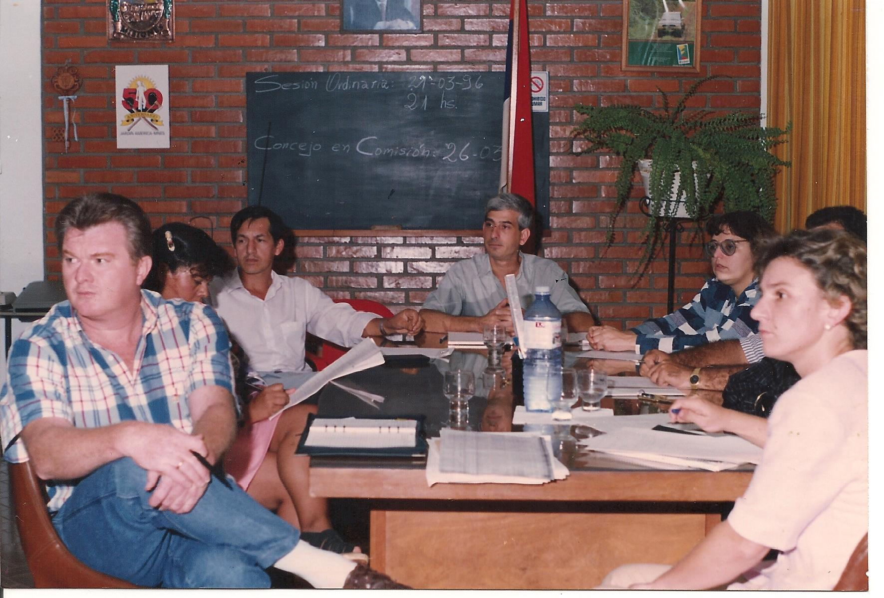 Concejo Deliberante de Jardín América en 1996. Concejales Tarón, Araujo y Peluso. (Fotografía tomada el martes 26 de marzo de 1996)